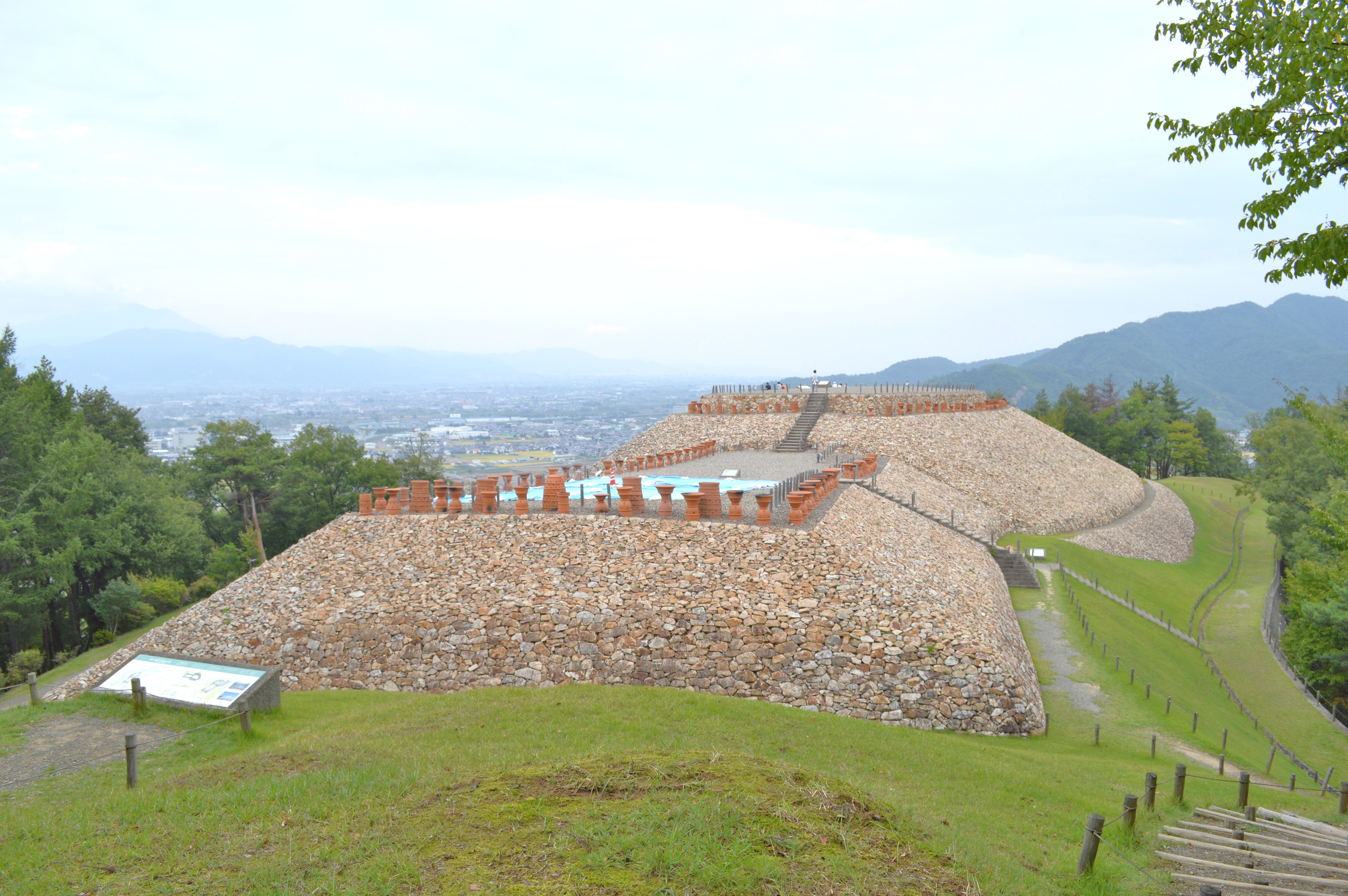 森将軍塚古墳 全景